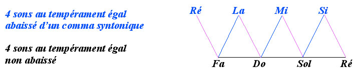 Temperament 24 pour 8 sons